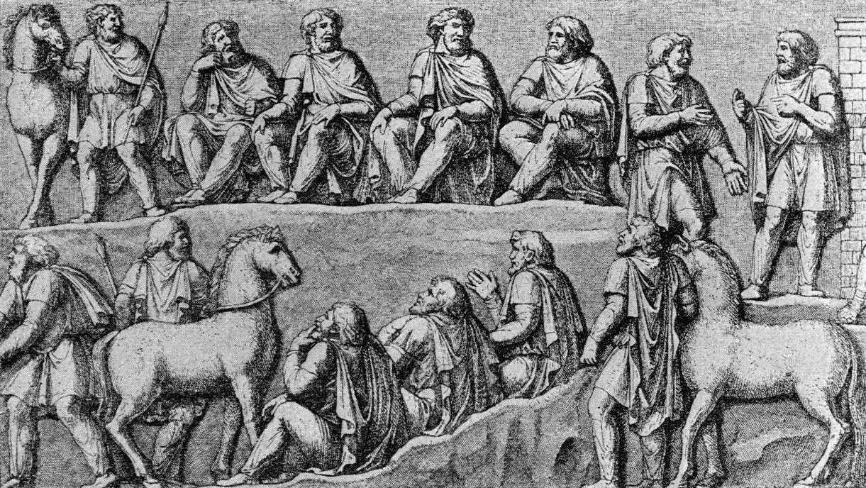 Germanische Ratsversammlung. Relief an der Mark-Aurel-Säule zu Rom Buch-Scan von Wolpertinger - Lizenz: gemeinfrei Leistungsschutzrechte abgelaufen. Alternatives Bild